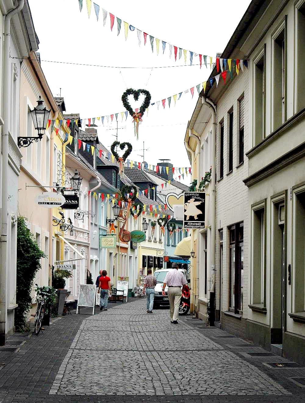 Altstadt Moers